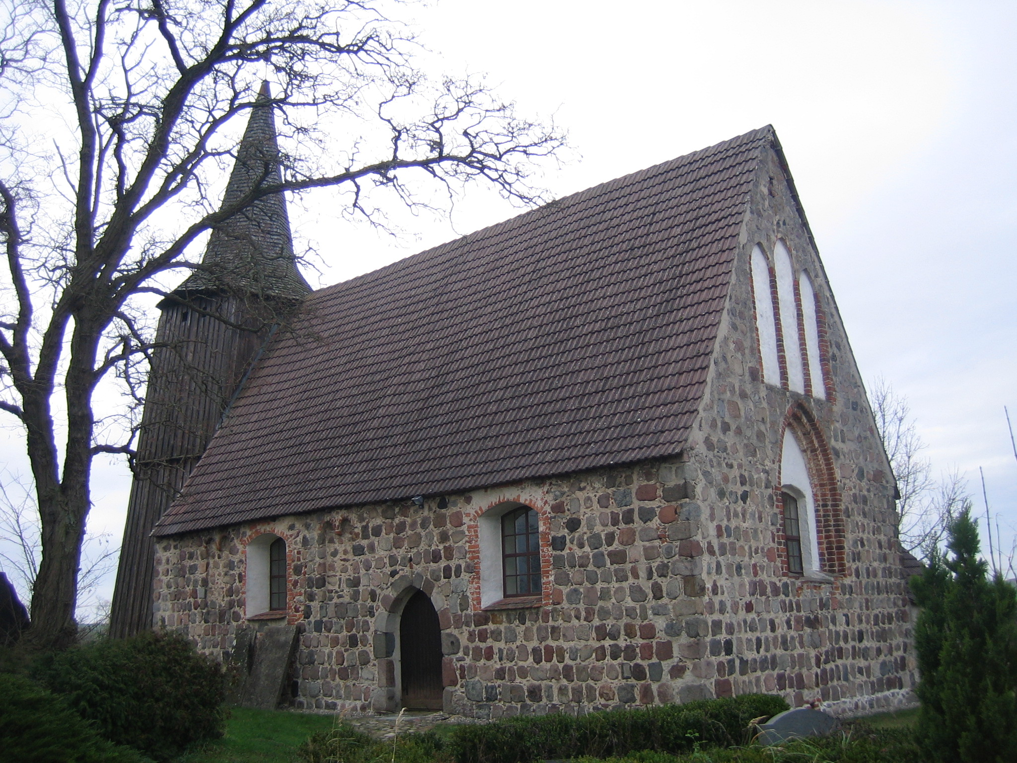 Dorfkirche Cammin, Landkreis Mecklenburgische Seenplatte